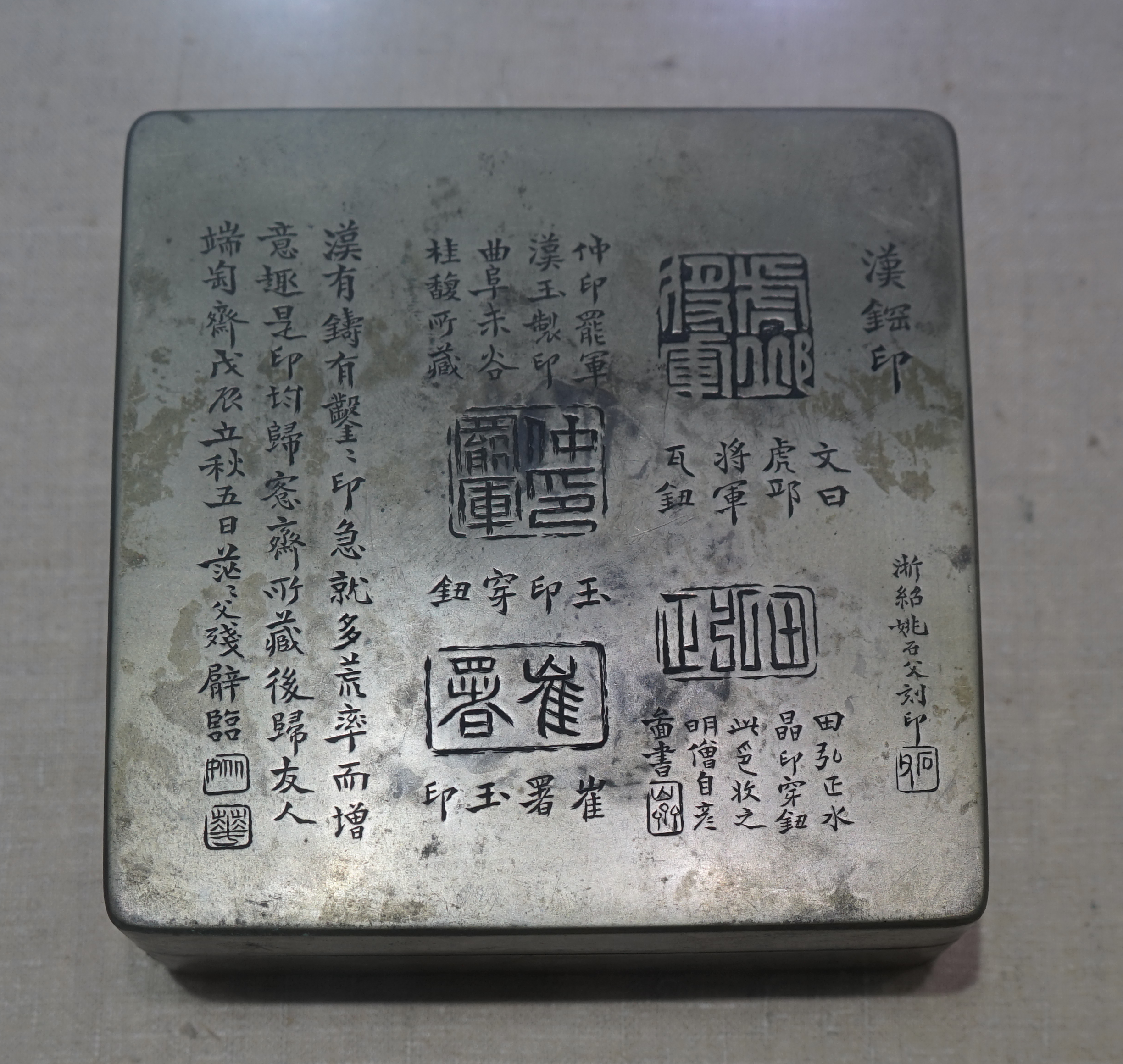 中文（中国大陆）: 林枫同志在东北使用过的铜墨盒。二级文物